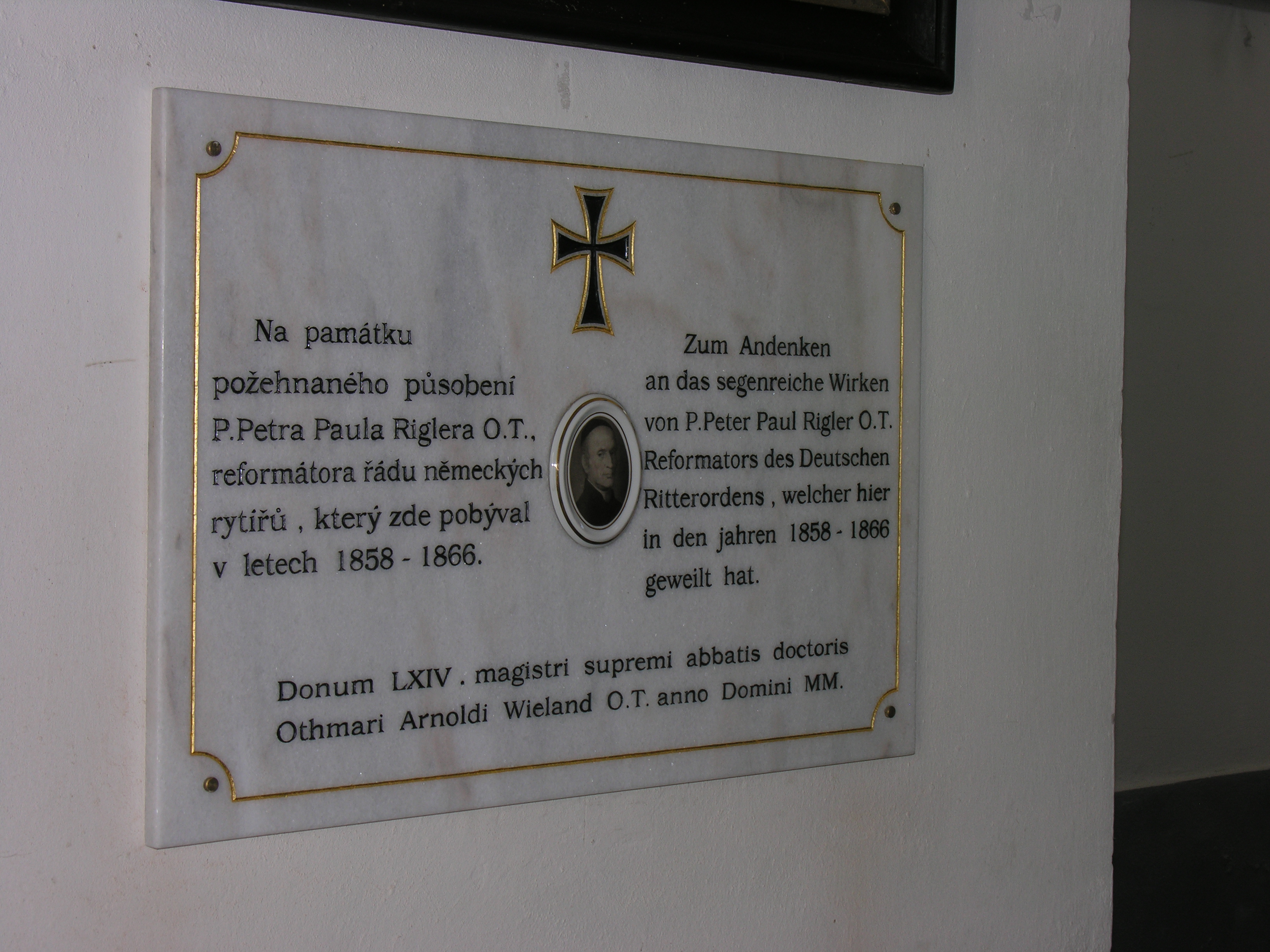 Gedenktafel für Peter Riegler in der Kirche auf dem Eulenburg (Sovinec)